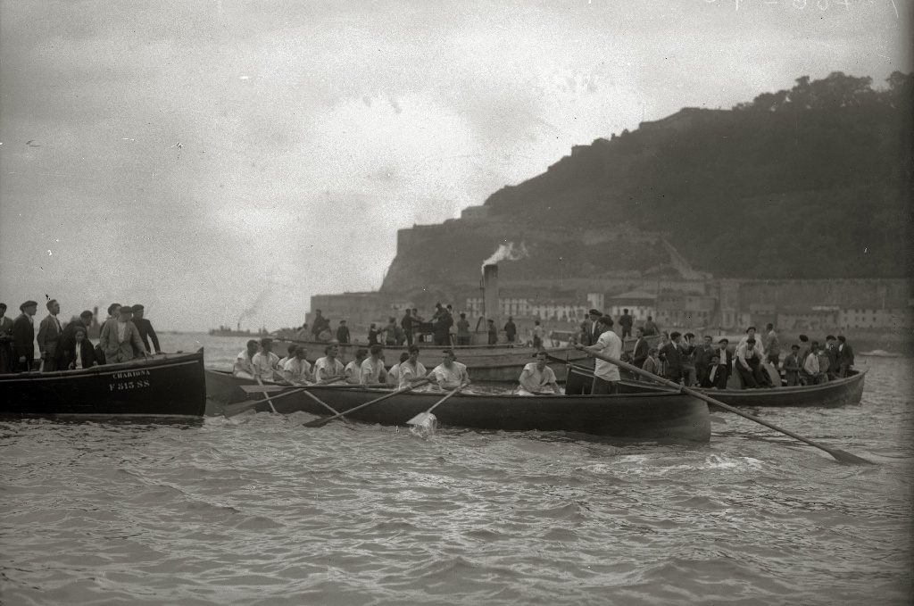 Título original: Regatas de traineras, Bandera de la Concha (13/13) Localización: San Sebastián (Guipúzcoa)